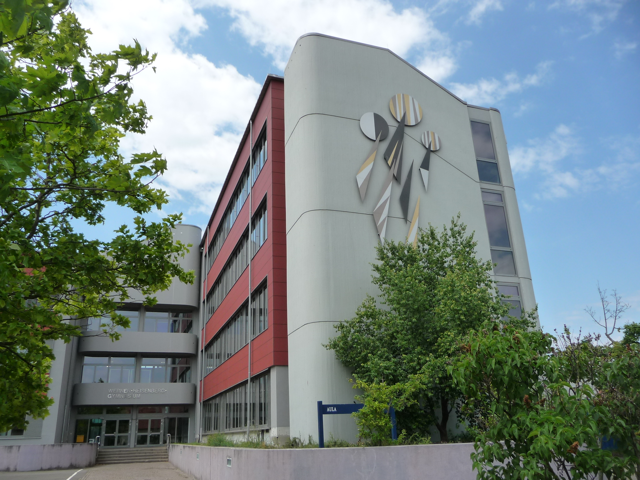 Trift ist ein Stadtteil von Bad Dürkheim, Rheinland-Pfalz